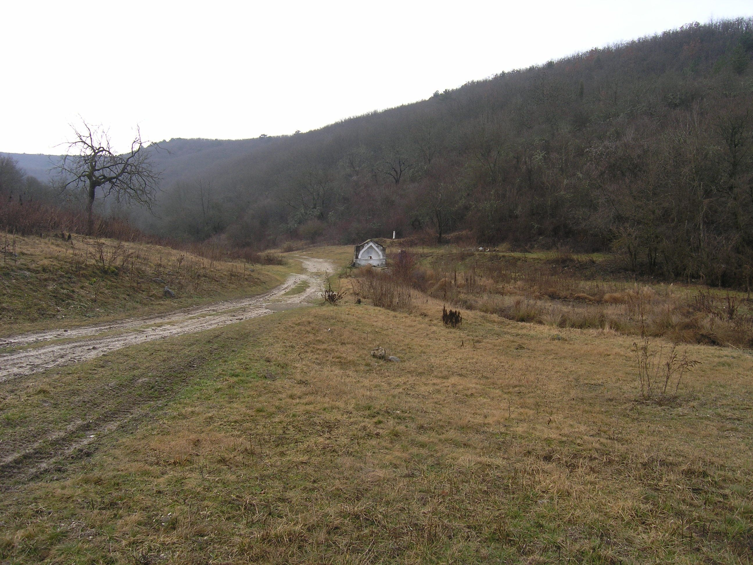 Родник бывшего села Истоки, Бахчисарайский район, Крым.